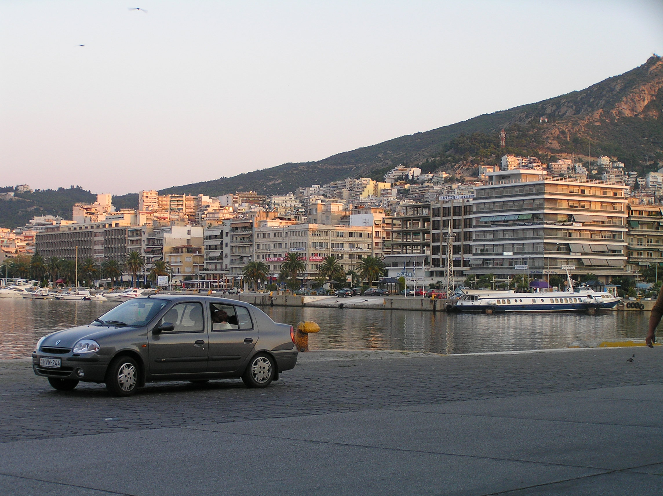 Kavala